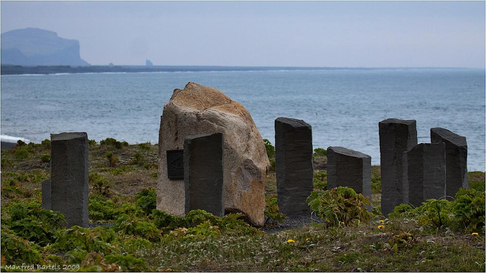 Fotografie des Gedenksteins Islandfischerei in Vík í Mýrdal, Island